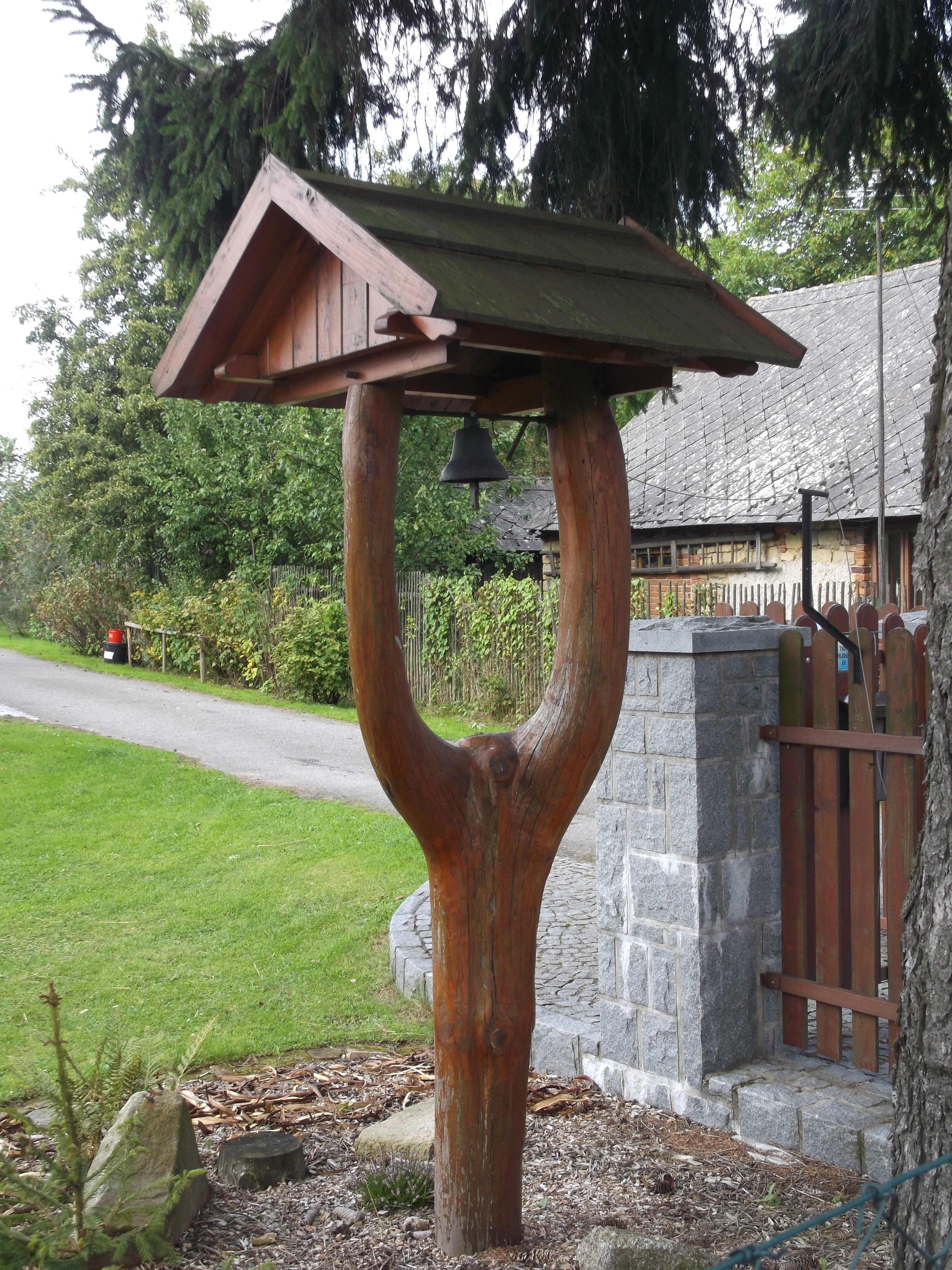 Benátky - zvonička